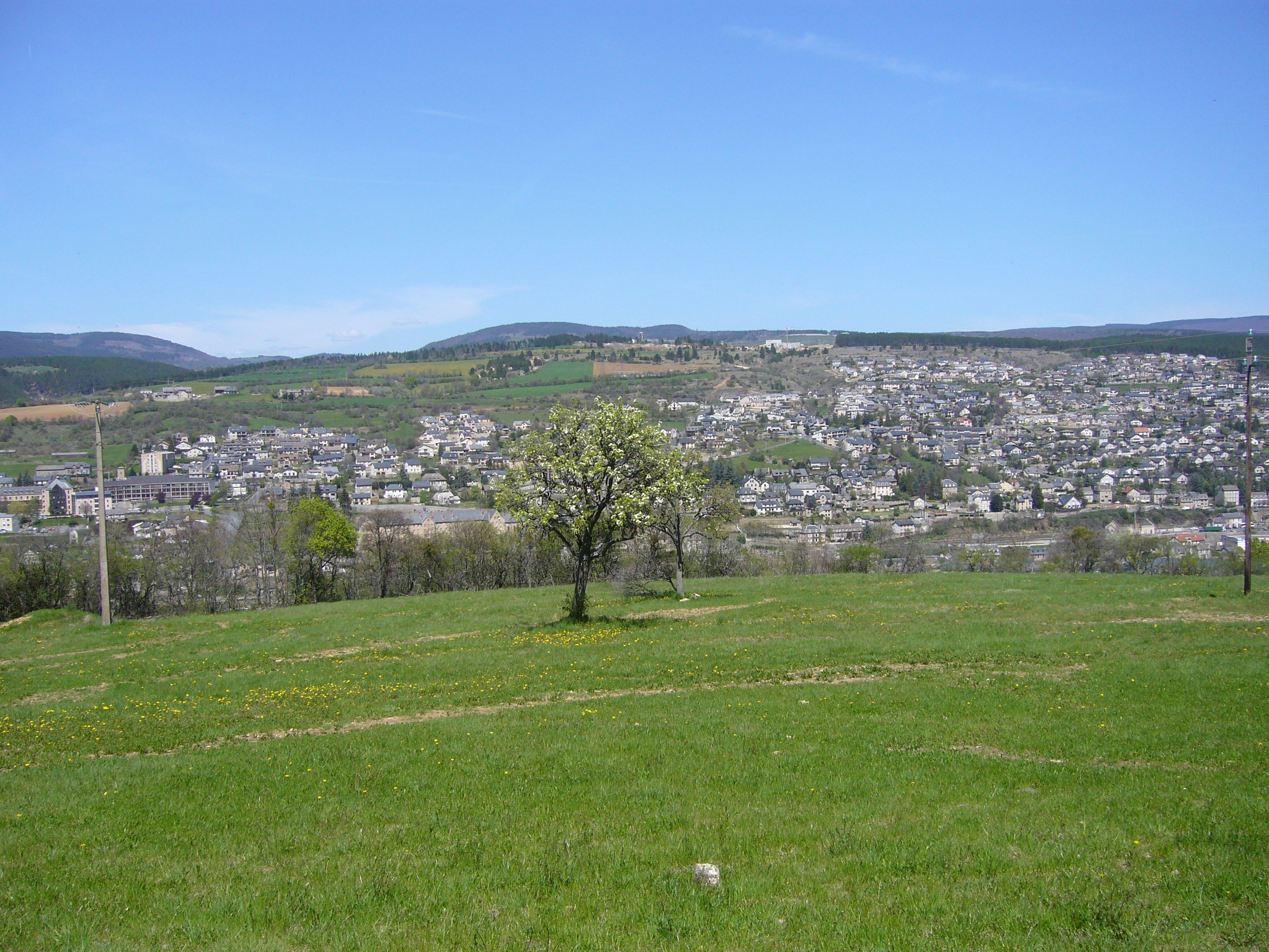 La colline du bourreau, au dessus de Mende (Lozère, France)